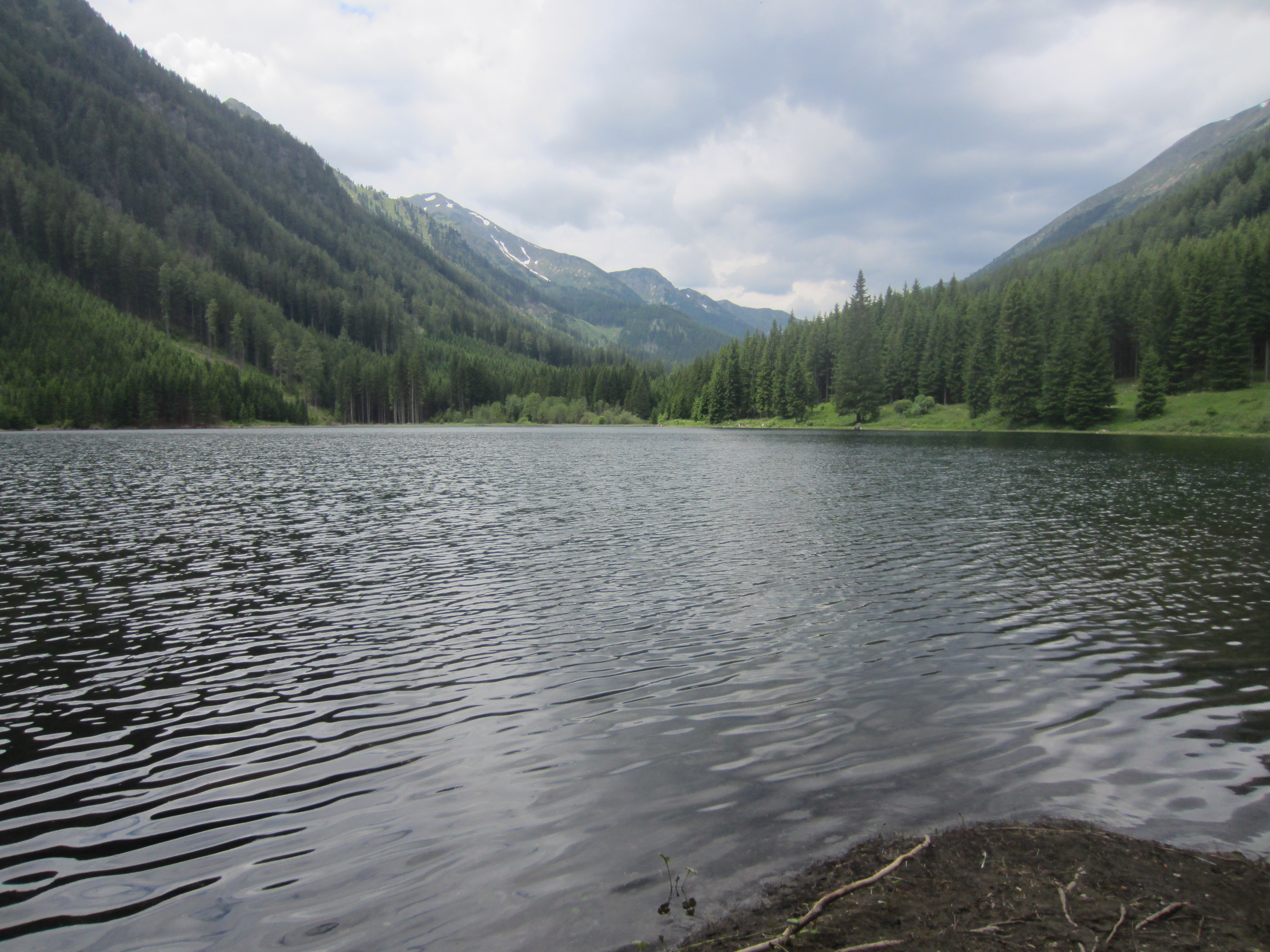 Ingeringsee